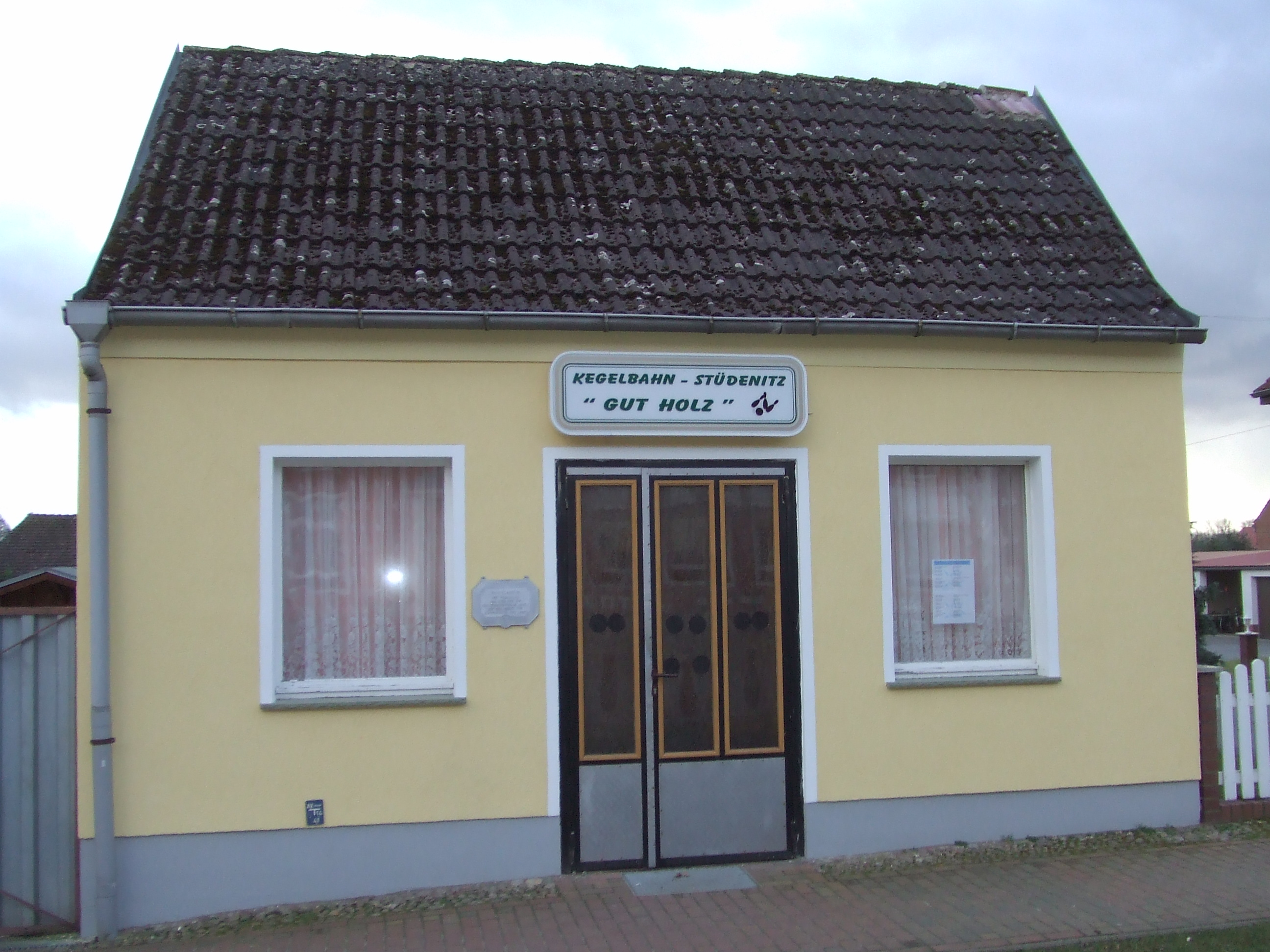 Kegelbahn Stüdenitz, Deutschland.